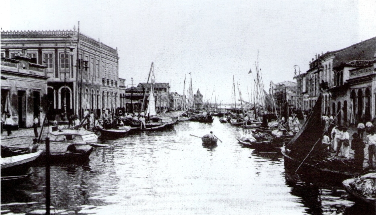 Antigo Igarapé das Almas, no Reduto Antigo, Belém.